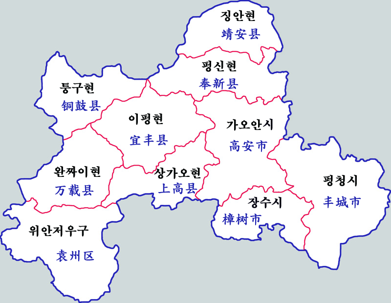 이춘시 현급행정구역